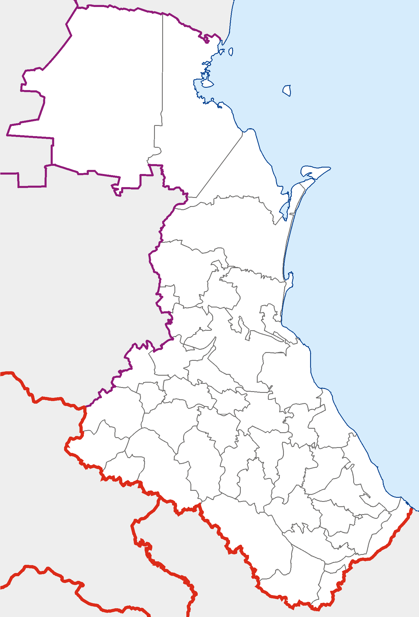 Mapa de localització de Daguestan.